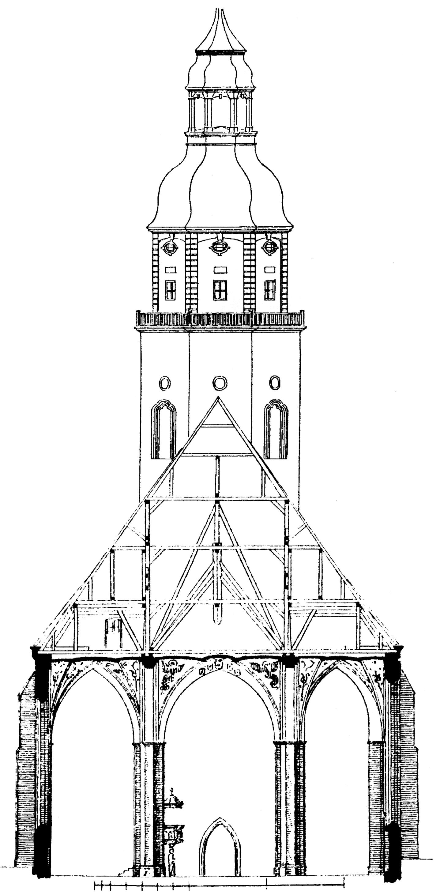 Marienkirche Querschnitt